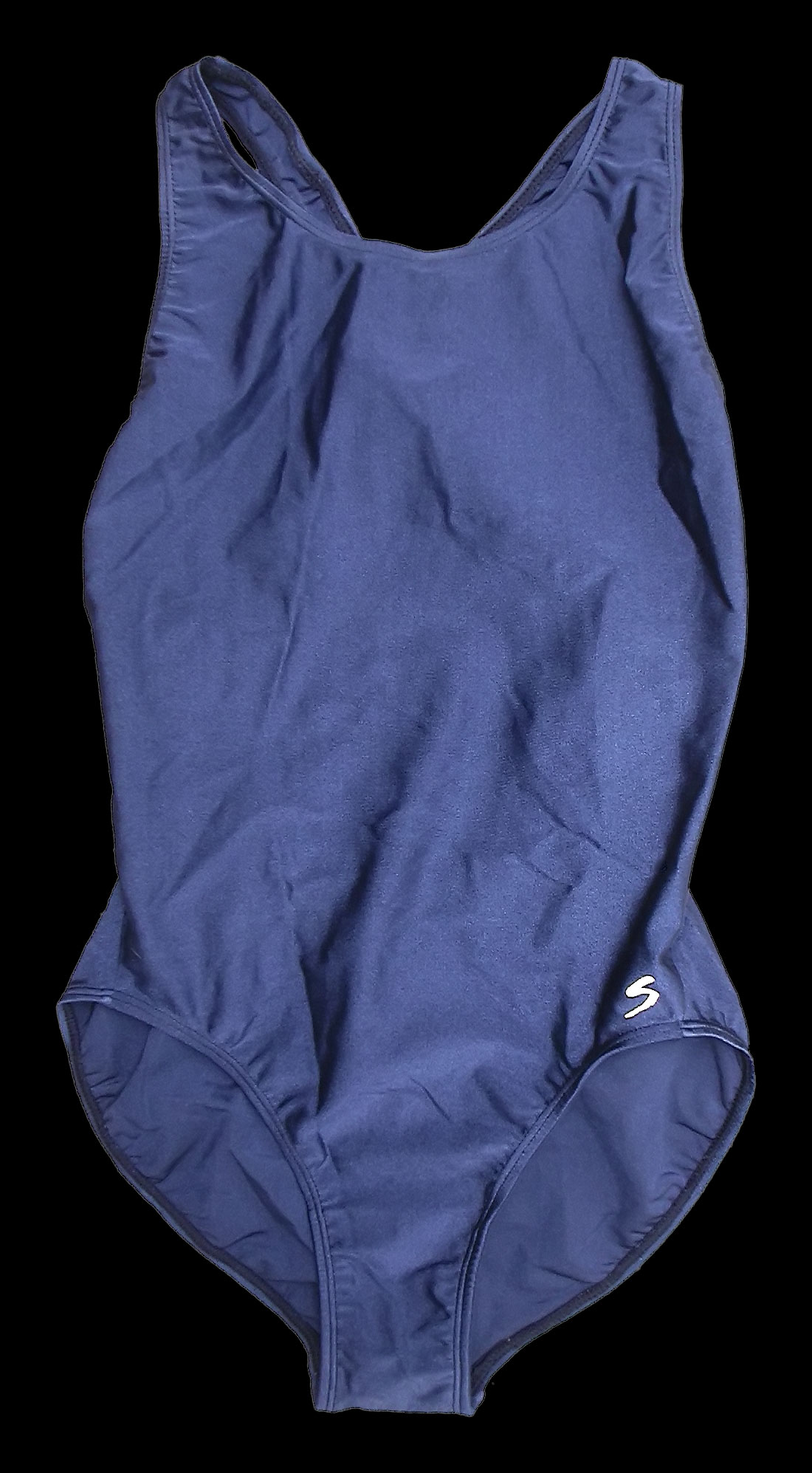 a classic ladies swimsuit